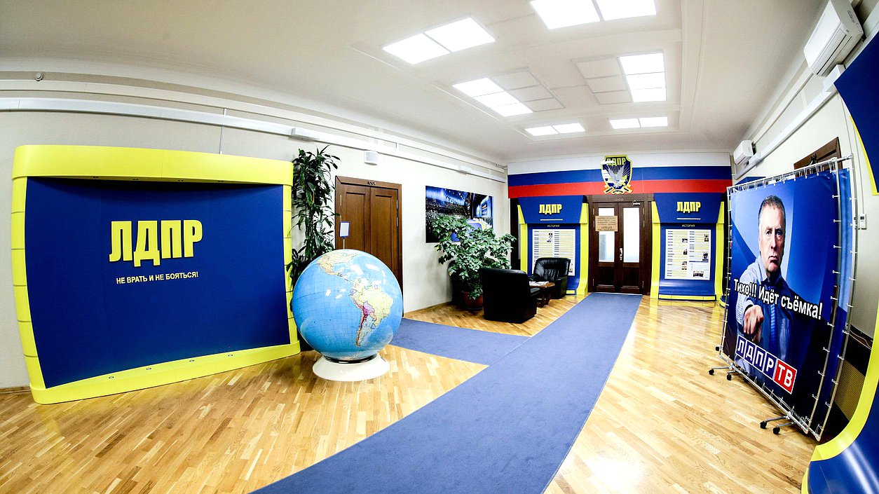 Холл фракции ЛДПР в Госдуме